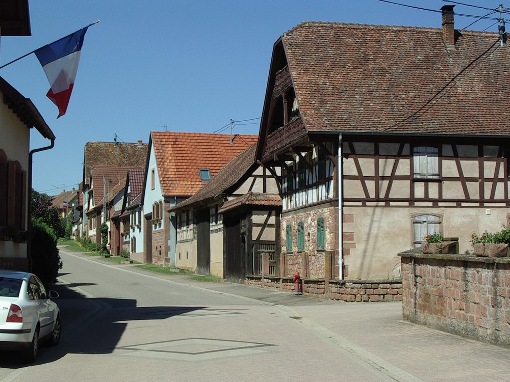 Geiswiller